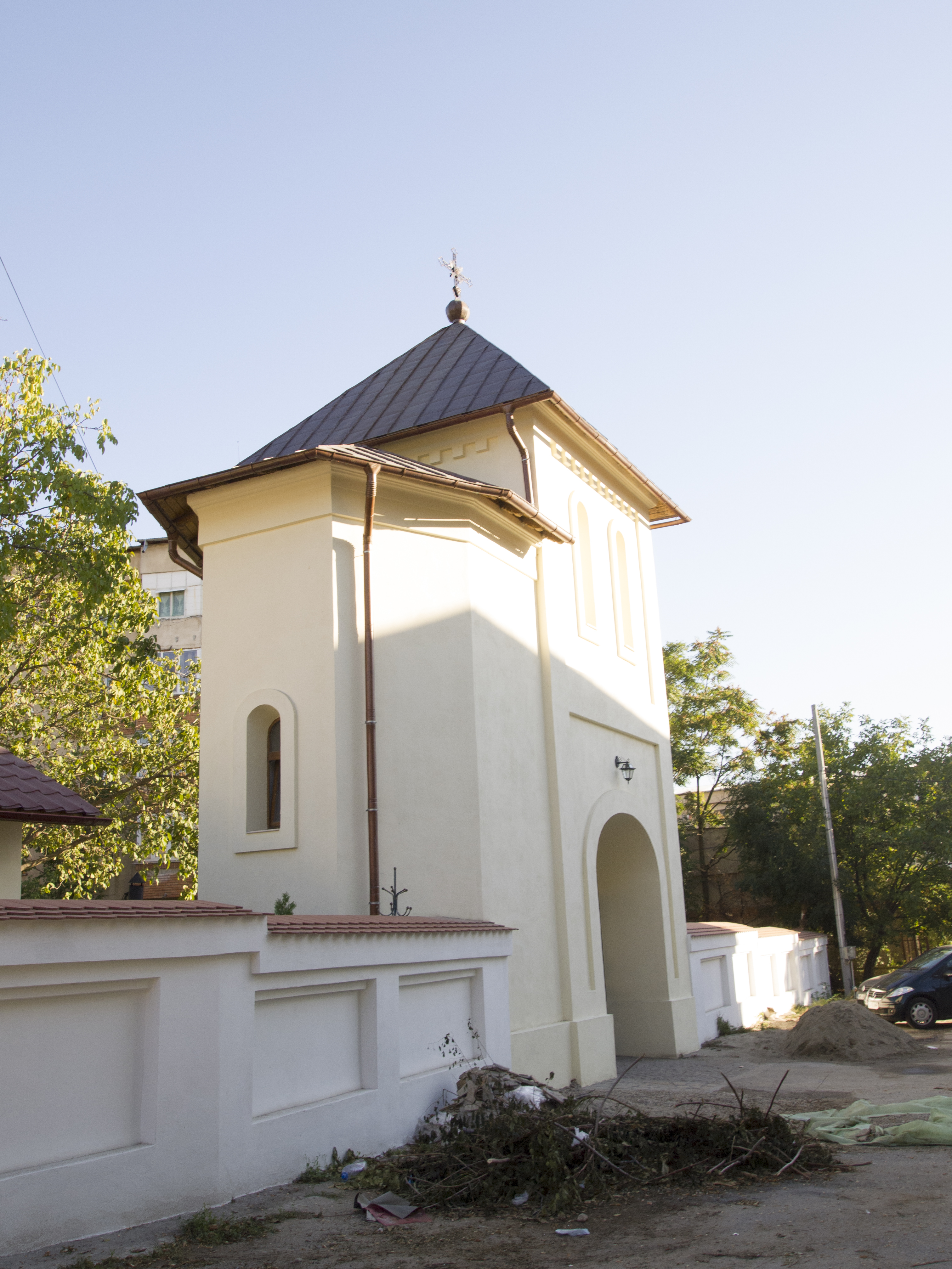 Turn intrare - Biserica Belivacă - Craiova 02